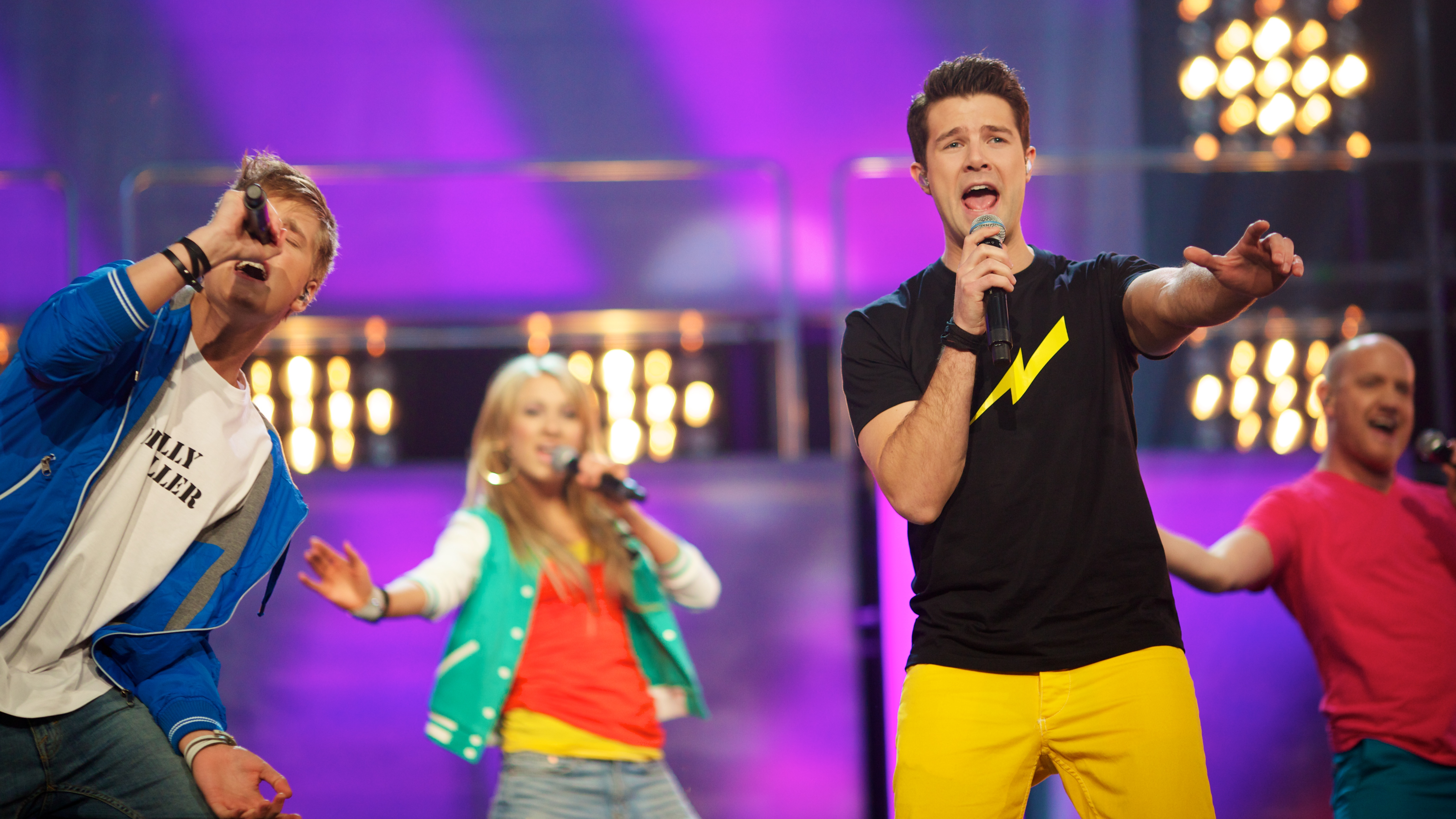 jørn Johan Muri og Didrik Solli-Tangen